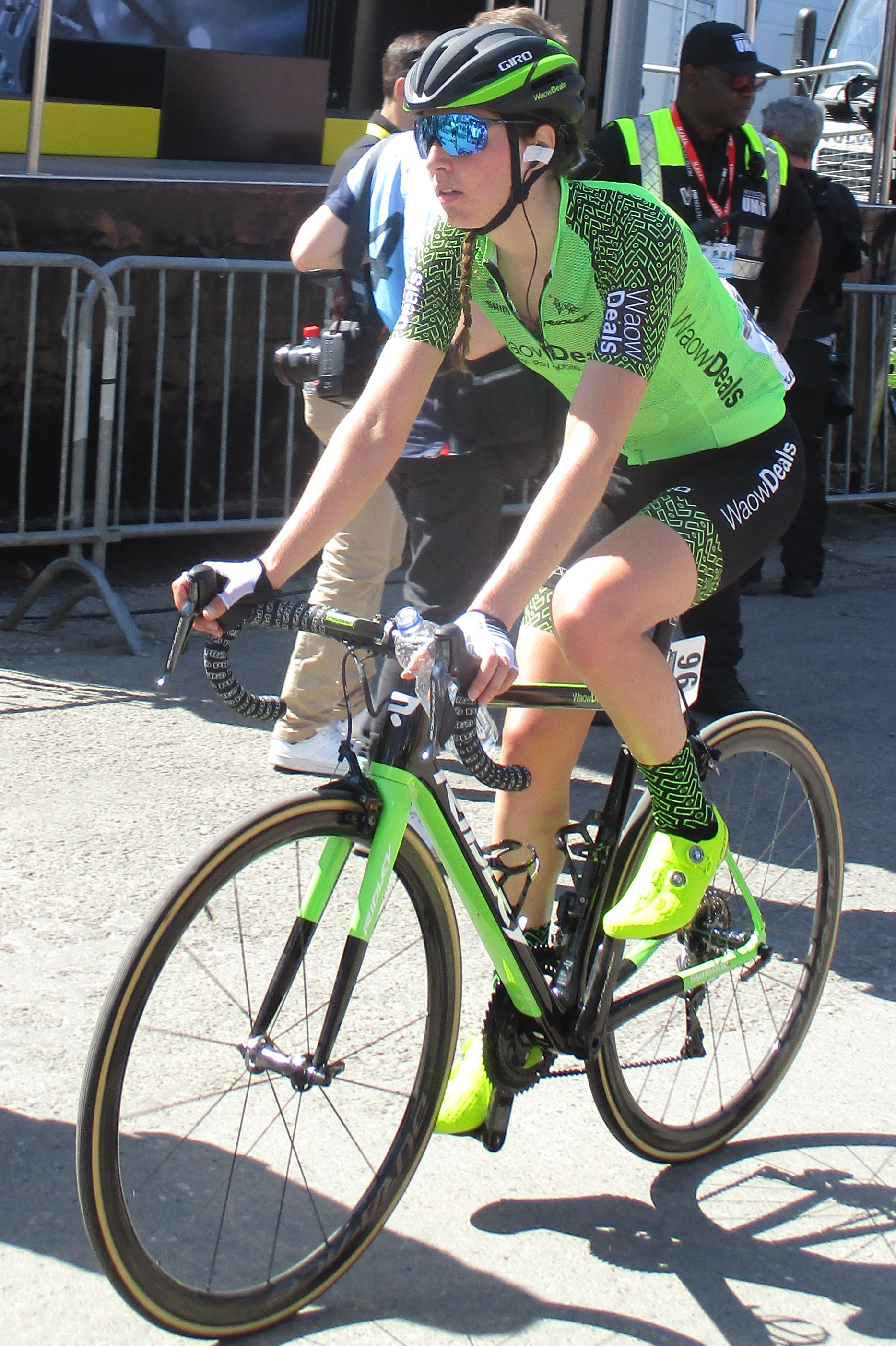 Finish van de Waalse Pijl 2018 op de Mur van Huy.